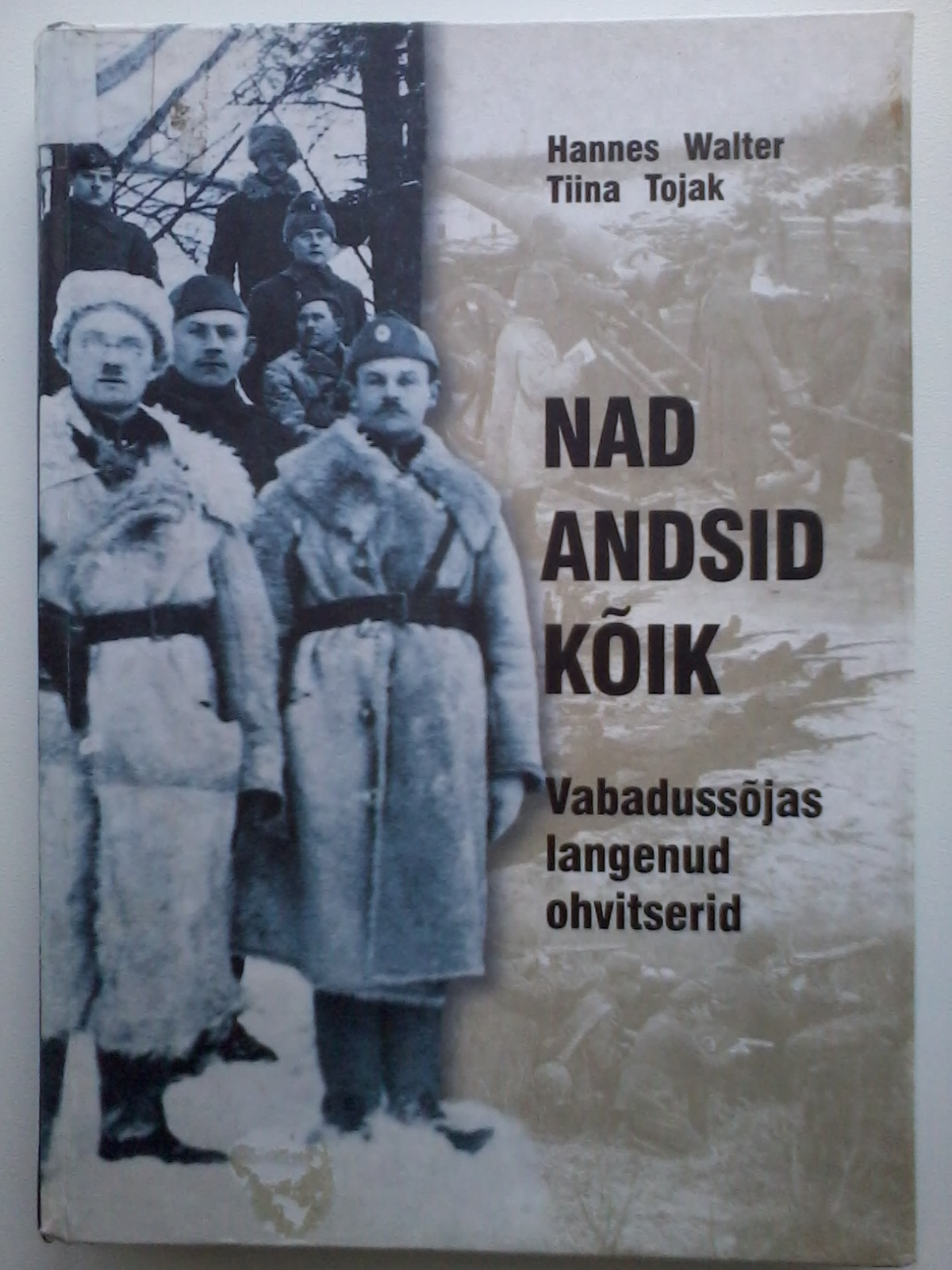 Hannes Walter, Tiina Tojak, "Nad andsid kõik. Vabadussõjas langenud ohvitserid", Tallinn, 2000.